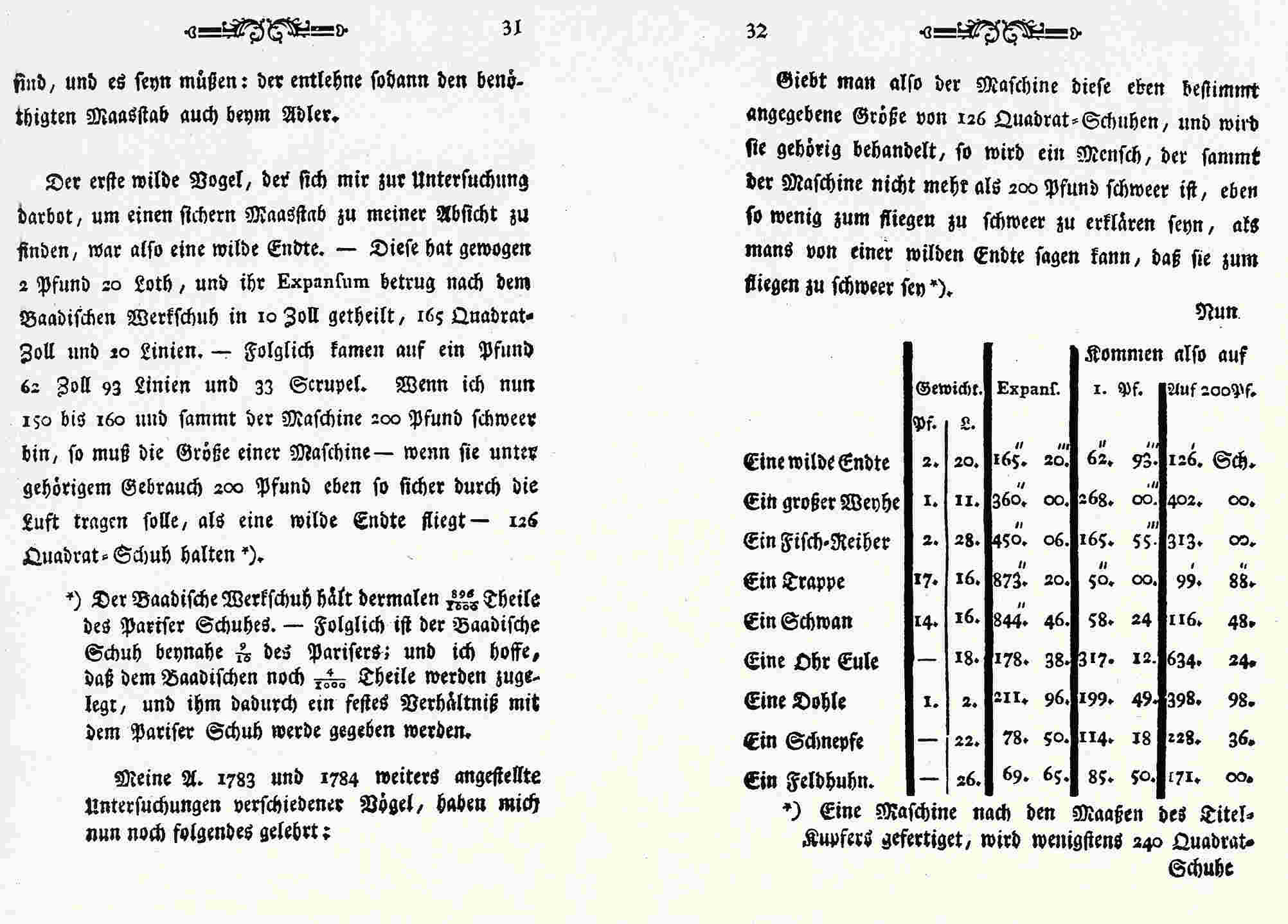 Aus: Carl Friedrich Meerwein (1784): Der Mensch! sollte der nicht auch zum Fliegen gebohren seyn?